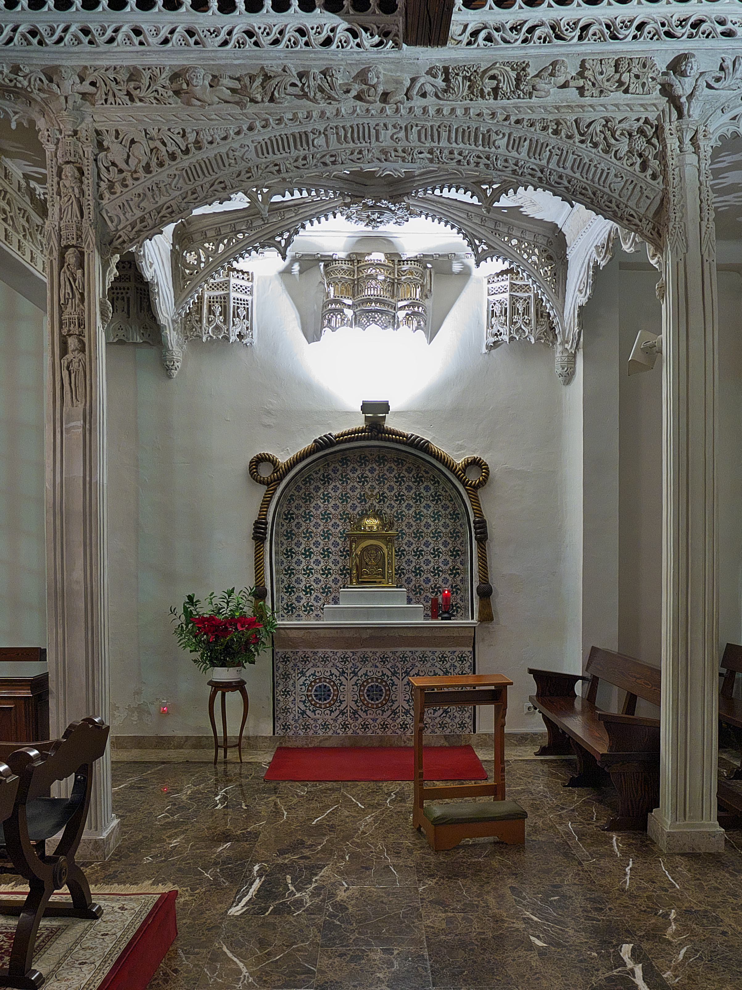 Doña María de Padilla, terciaria franciscana, se enterró en el monasterio astudillano antes del definitivo en la Capilla Real de la Catedral de Sevilla. Por tal motivo, el mudéjar Braymi construyó este templete sobre el lugar.